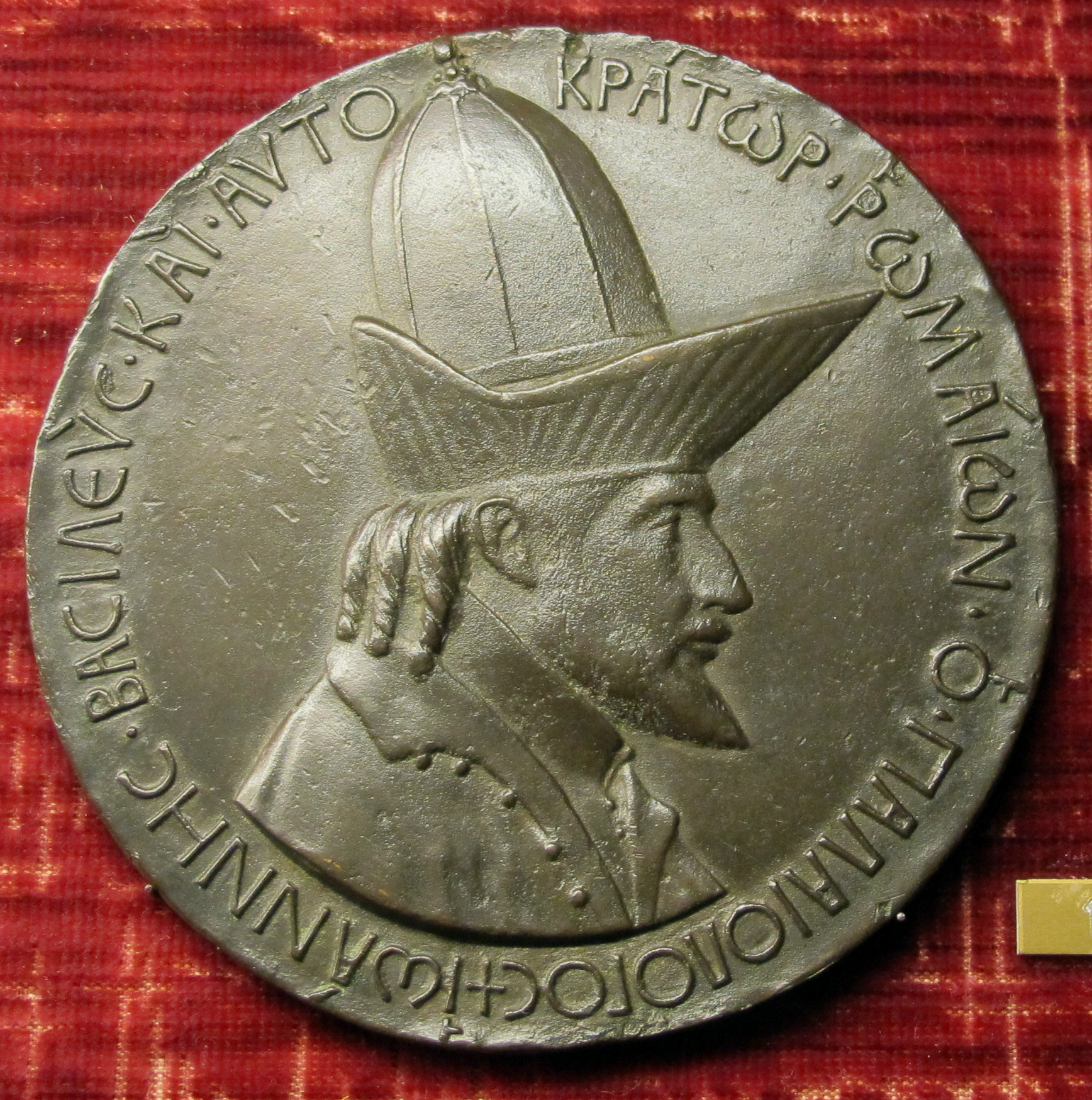 Medaglia rinascimentale italiana